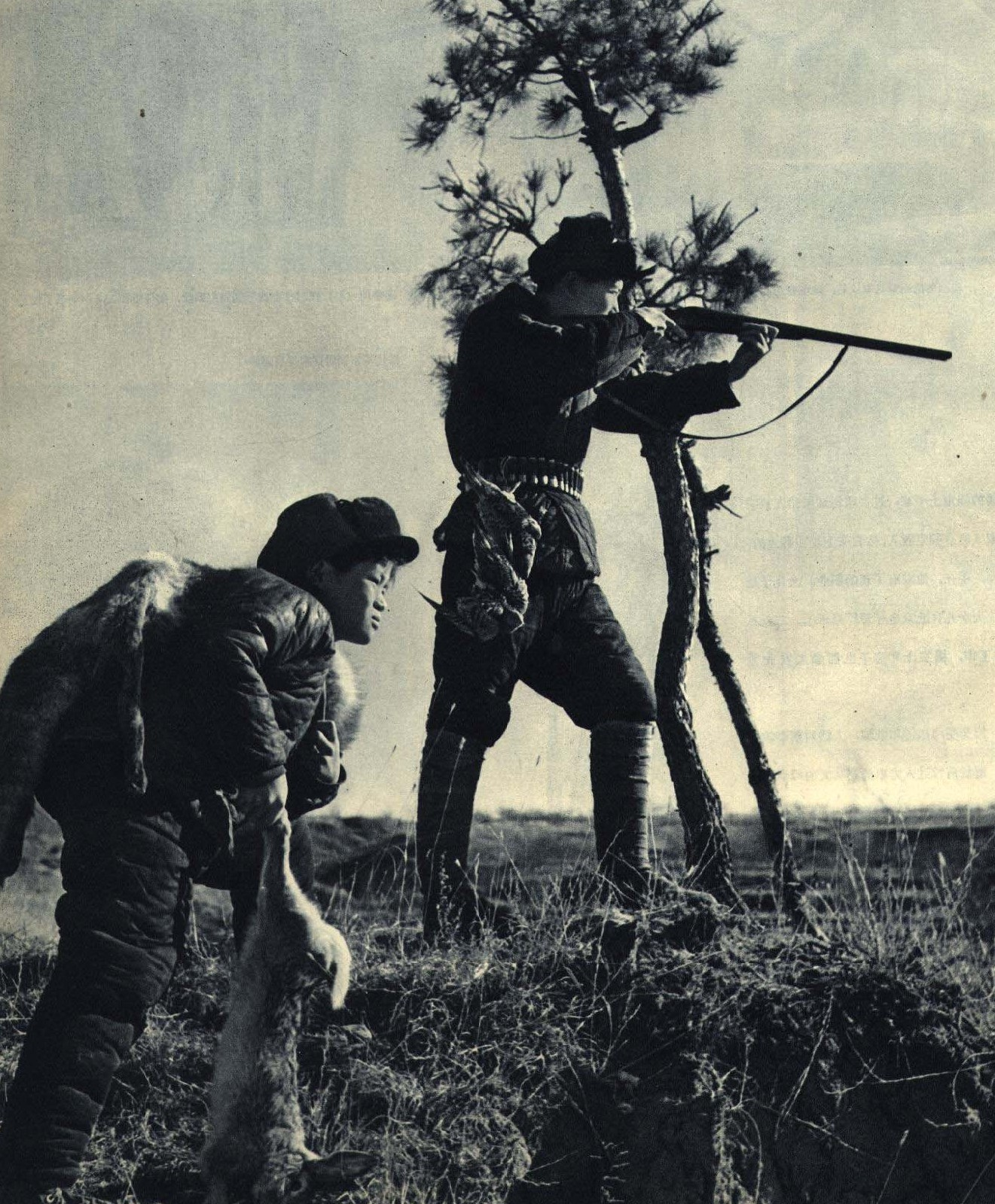 1962-01 1962年 冬猎